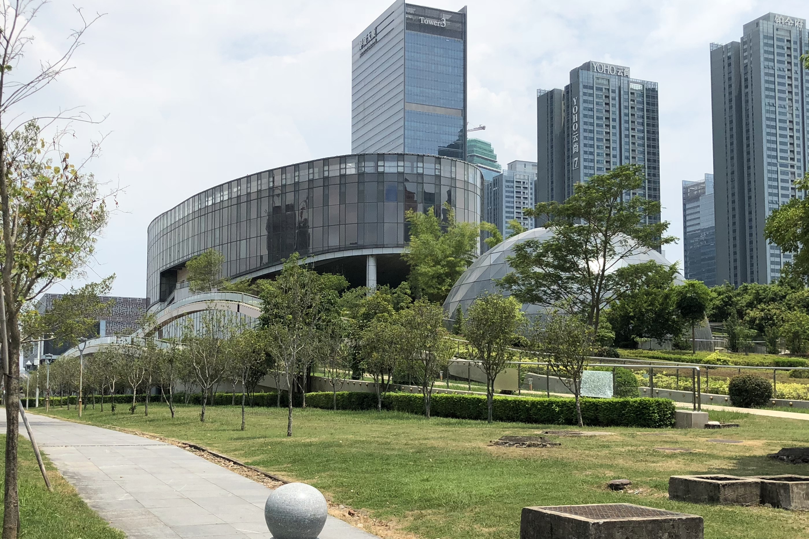 中文（中国大陆）: 惠州科技馆